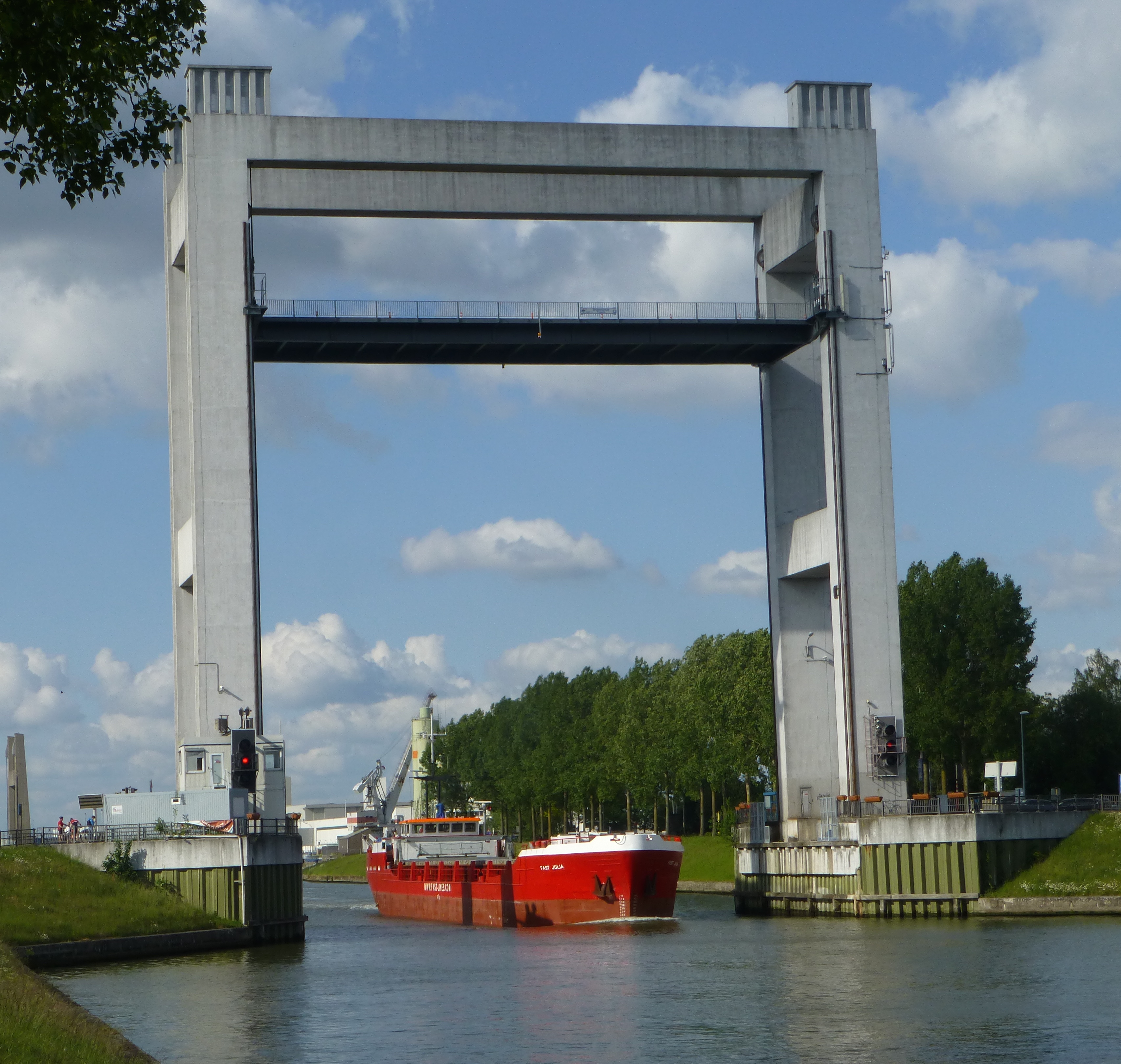 Brielenbrug over het Zeekanaal Brussel-Schelde in Tisselt opened for a marine vessel.